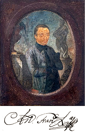 retrato de Aleijadinho, realizado por Euclásio Ventura